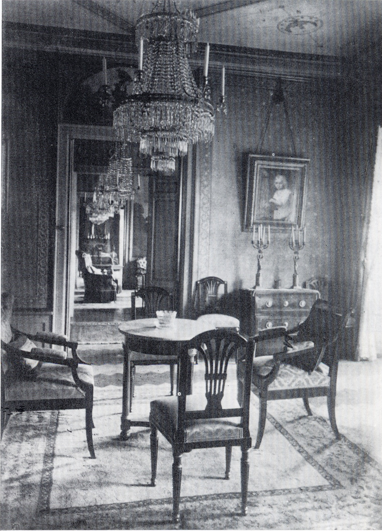 Seidenes Zimmer im Rauch’schen Palais in Heilbronn